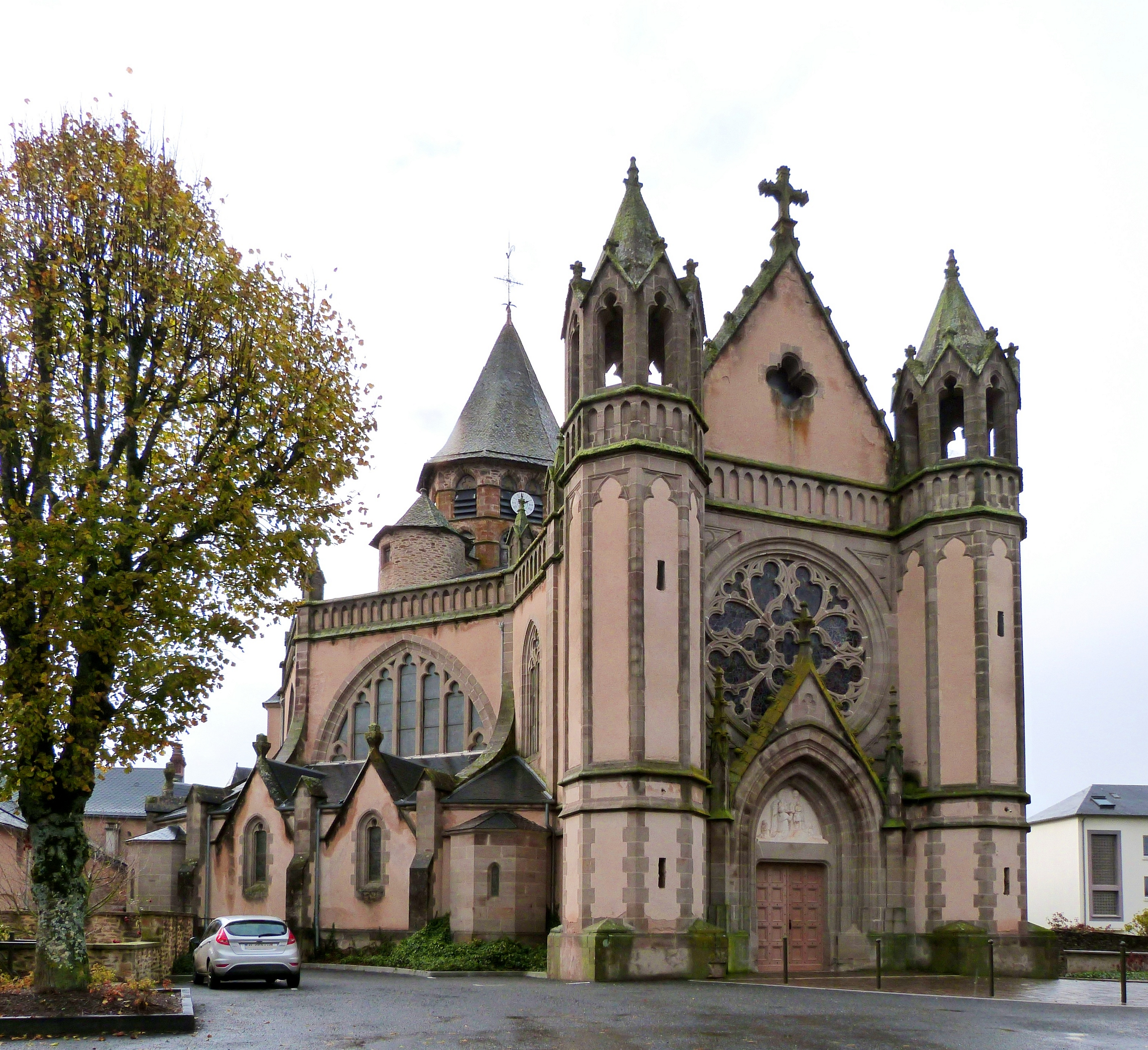 La basilique Notre Dame de Ceignac vue de l'extérieur